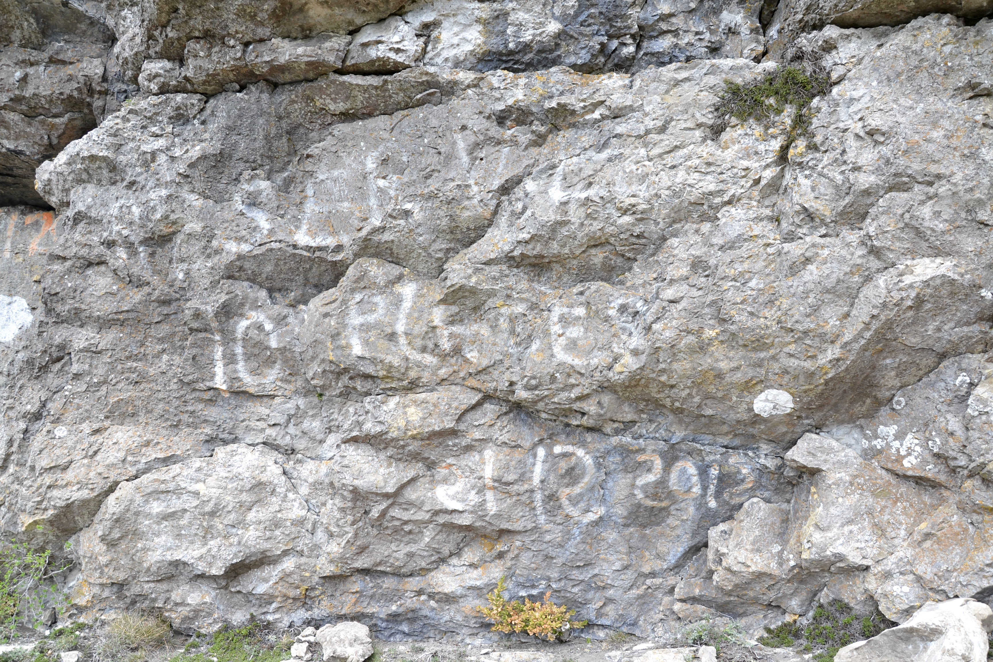 Traces d'anciens graffitis évoquant la fin du monde sur le pech de Bugarach (Aude, France).